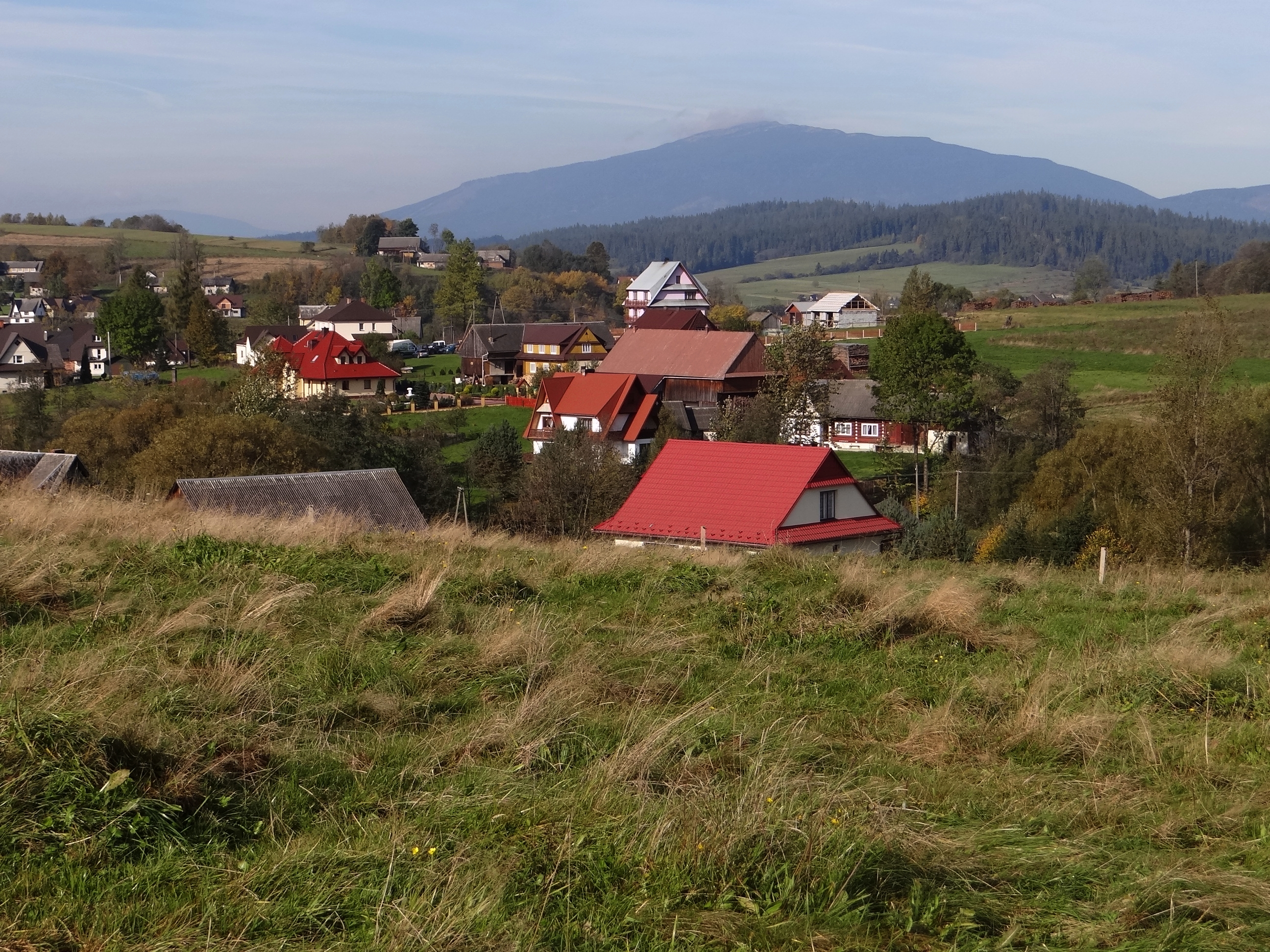 Podsarnie i widok na Babią Górę